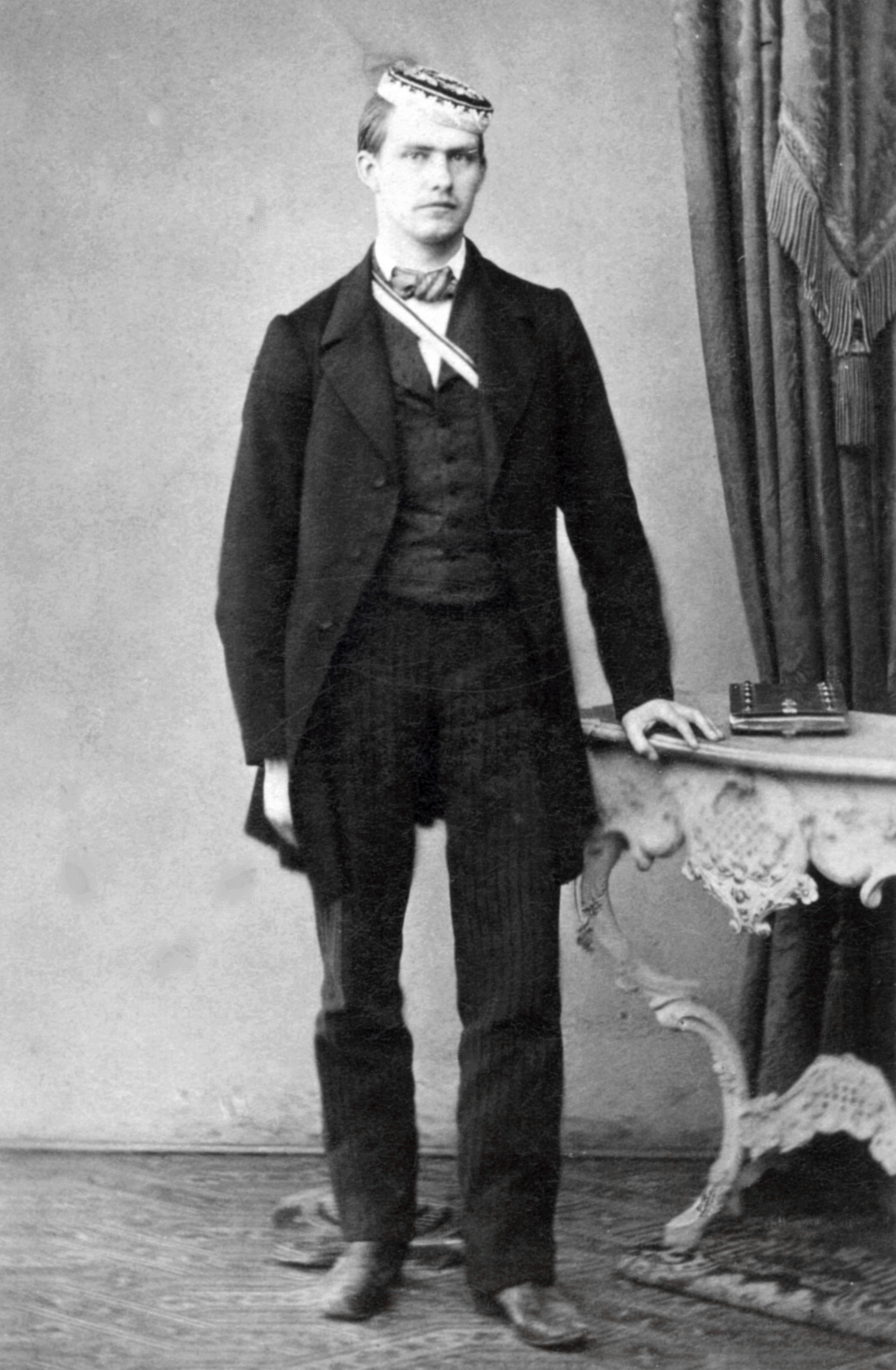 Fotografie von Alexander Pancratz als Corpsbursche der Suevia München